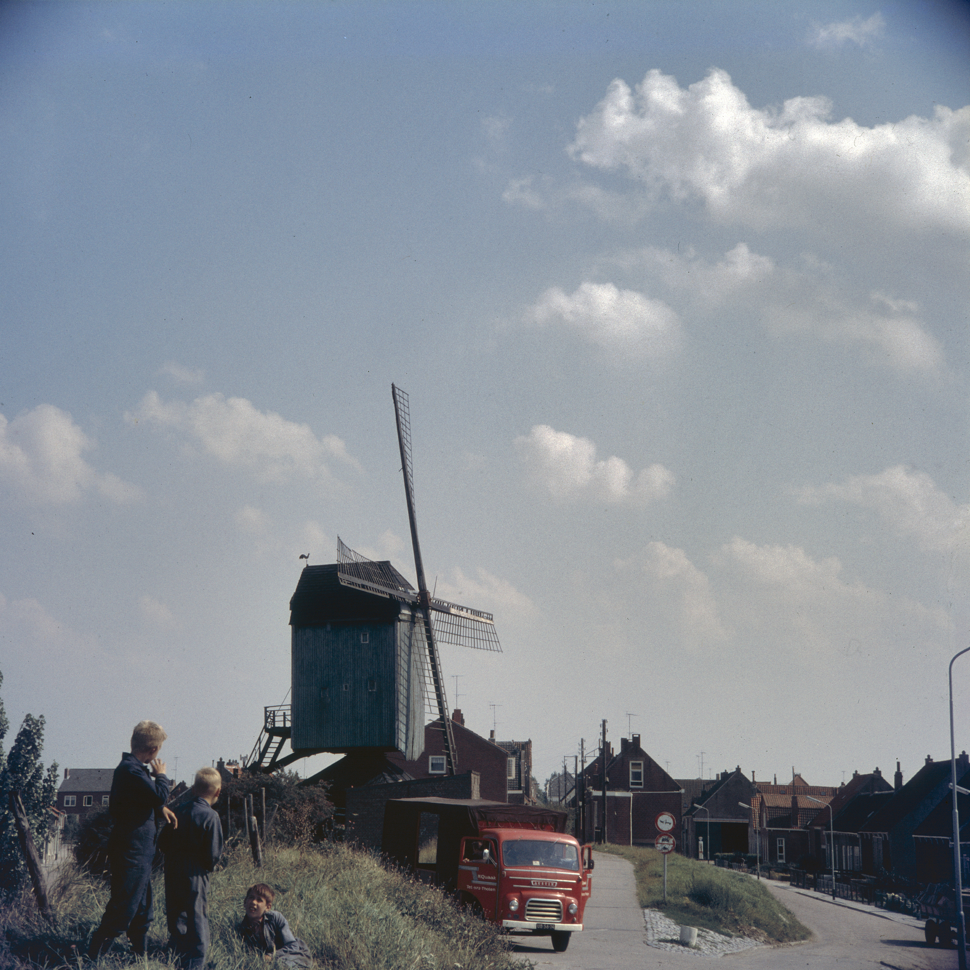 Standerdmolen: Overzicht (opmerking: Diacollectie Molens)